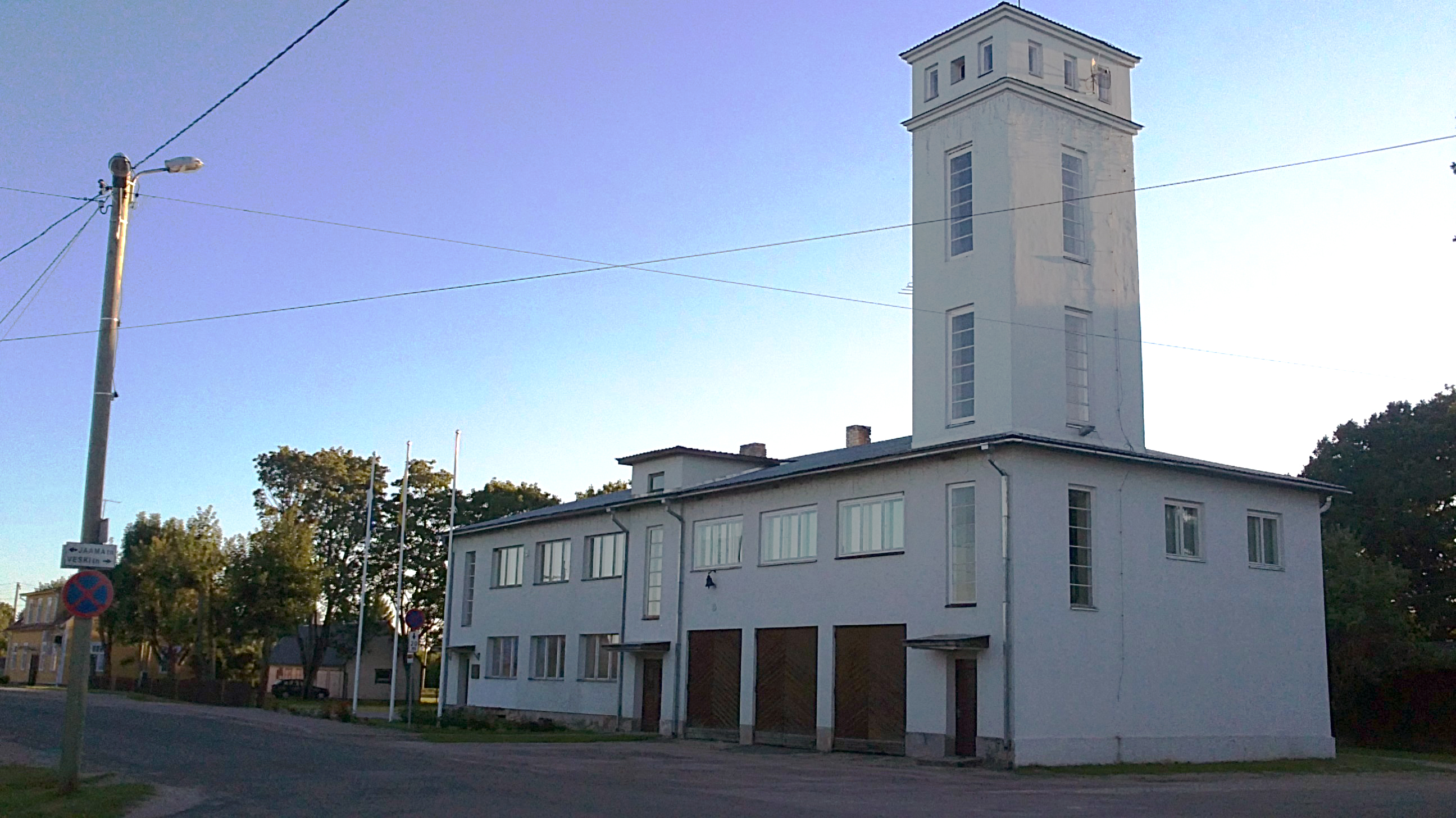 Võhma linnavalitsuse hoone